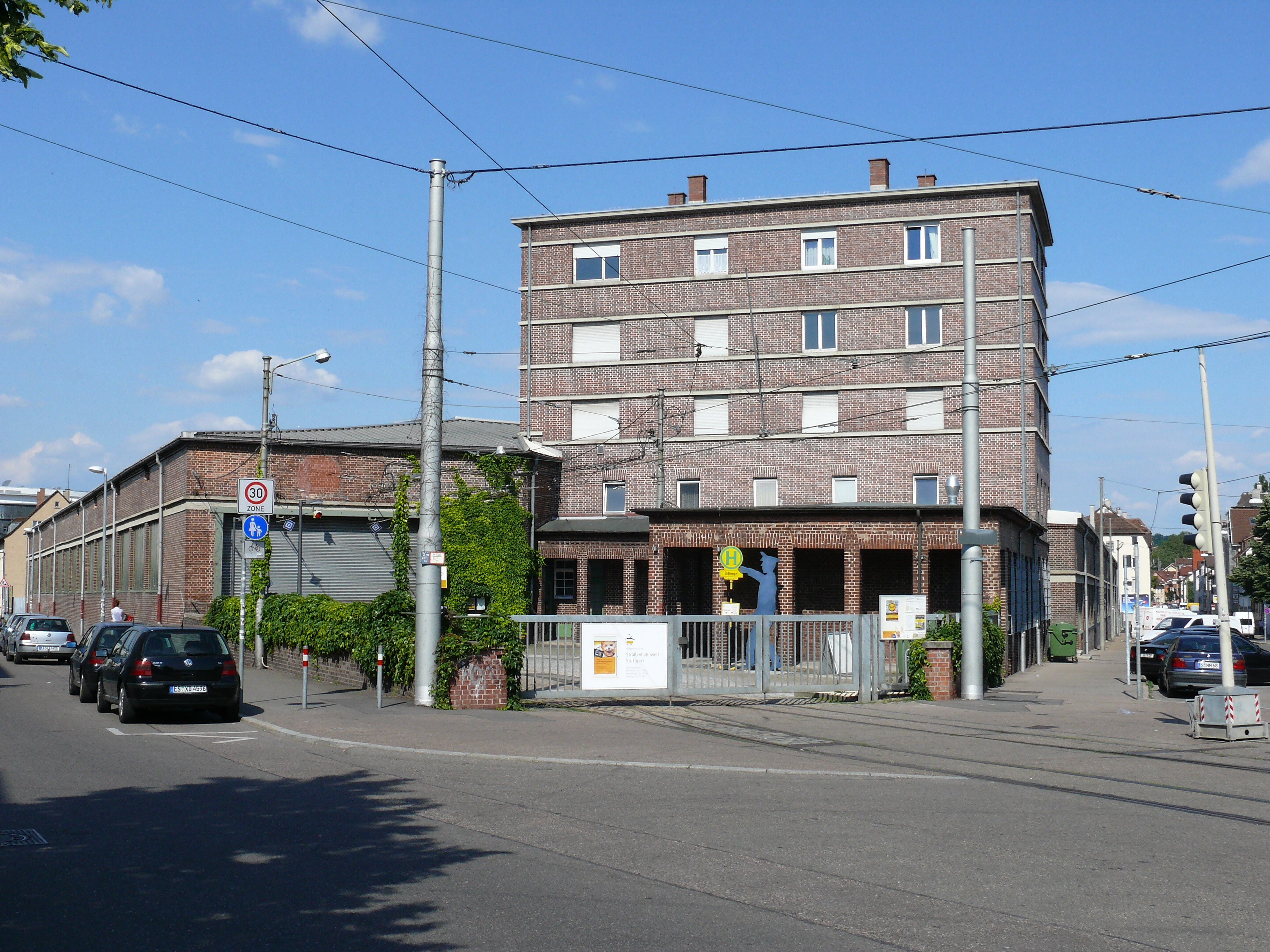 Das (neue) Straßenbahnmuseum in Stuttgart-Bad Cannstatt, in einem denkmalgeschützten ehemaligen Depot von 1929.